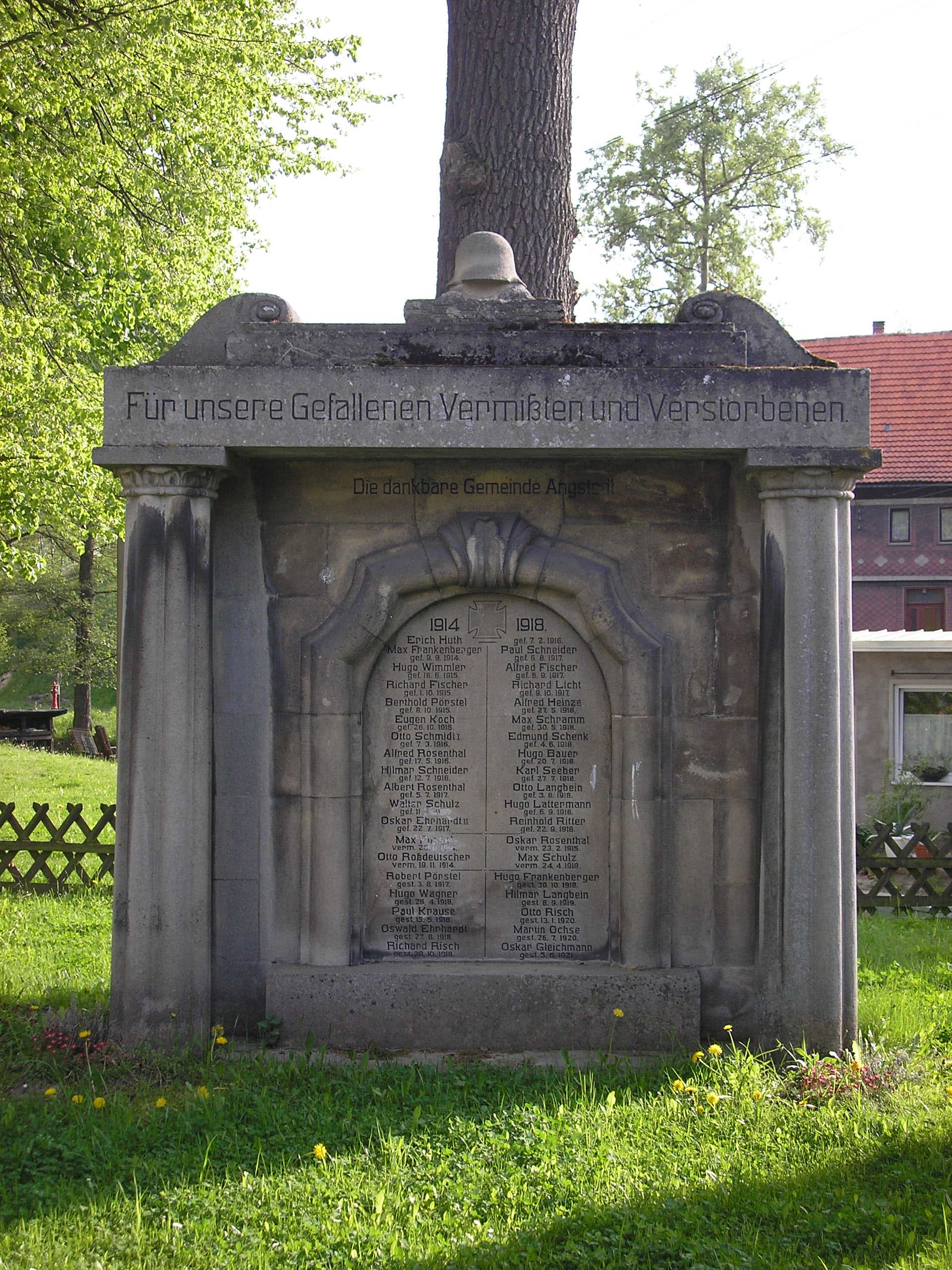 Denkmal für die Opfer des 1. Weltkrieges aus der Gemeinde Angstedt (heute Gräfinau-Angstedt; Thüringen).